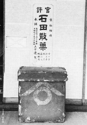 Ishida medicine